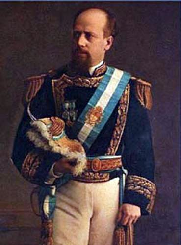 Retrato al óleo del Presidente Julio Argentino Rica, realizado por el artista Jenaro Pérez durante su primer gobierno (1880-1886)